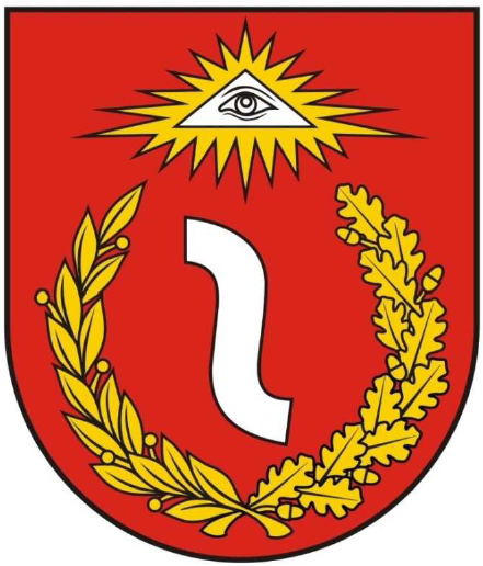 Nowy herb Boguchwały